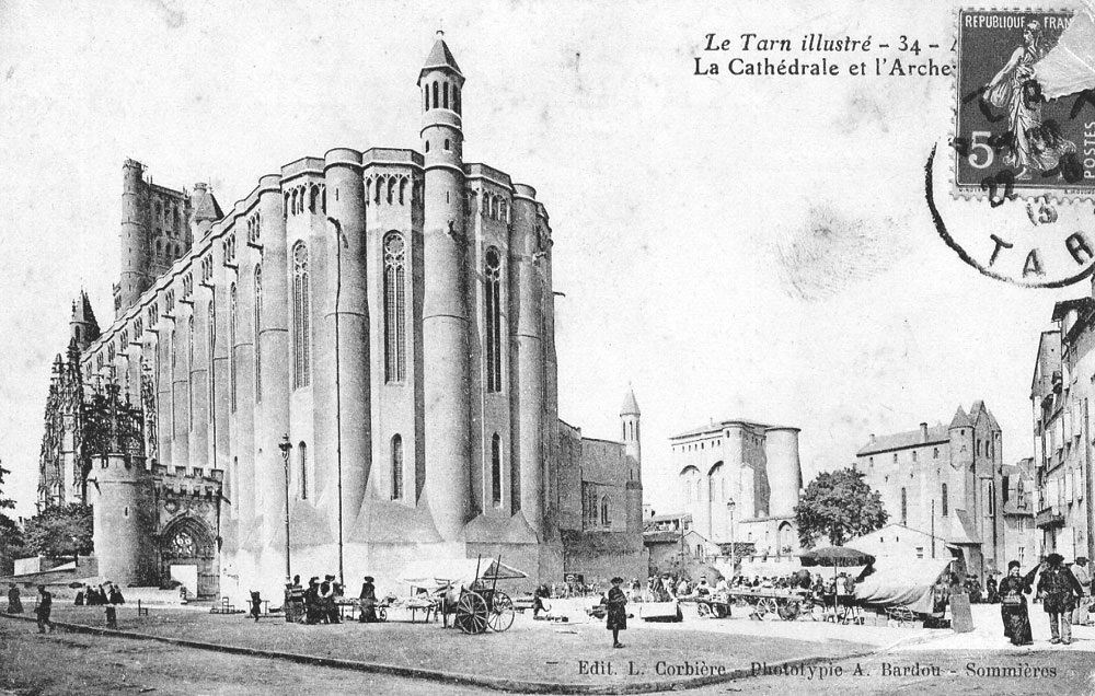 France, Tarn (81), Albi. Cathédrale Sainte-Cécile d'Albi